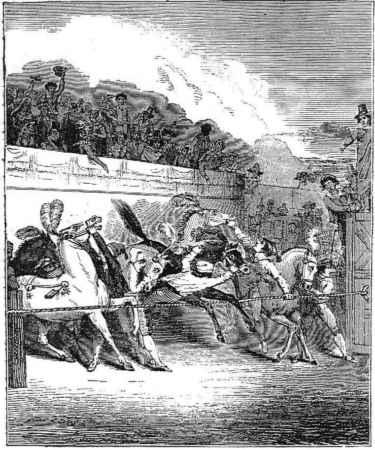 Les chevaux sur le départ, via del Corso, à Rome, au moment du Carnaval de cette ville.